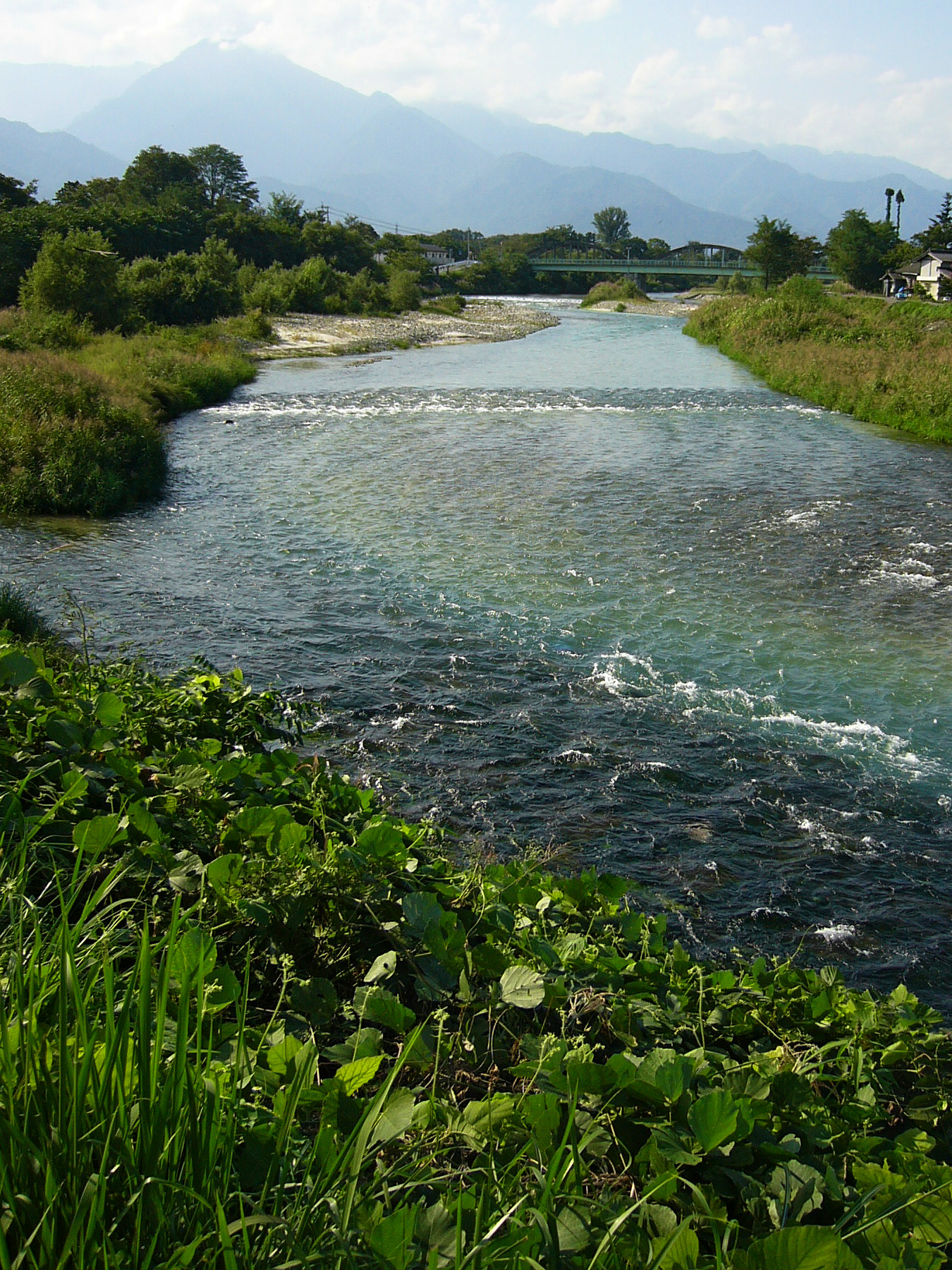 Hotaka-river in Azumino, Nagano, Japan